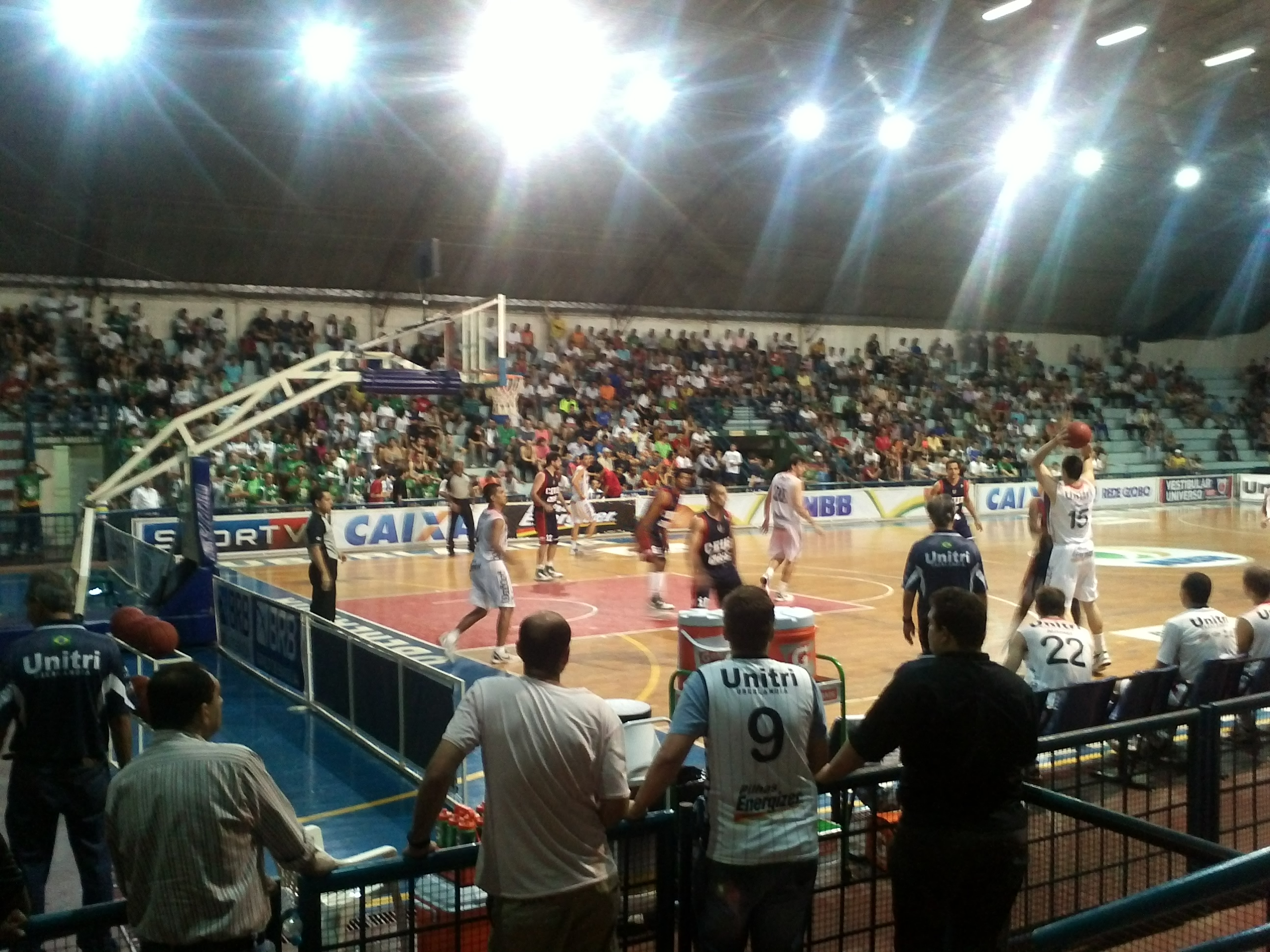 Lance do jogo entre Unitri\Uberlândia e Brasília no Uberlândia Tenís Clube.